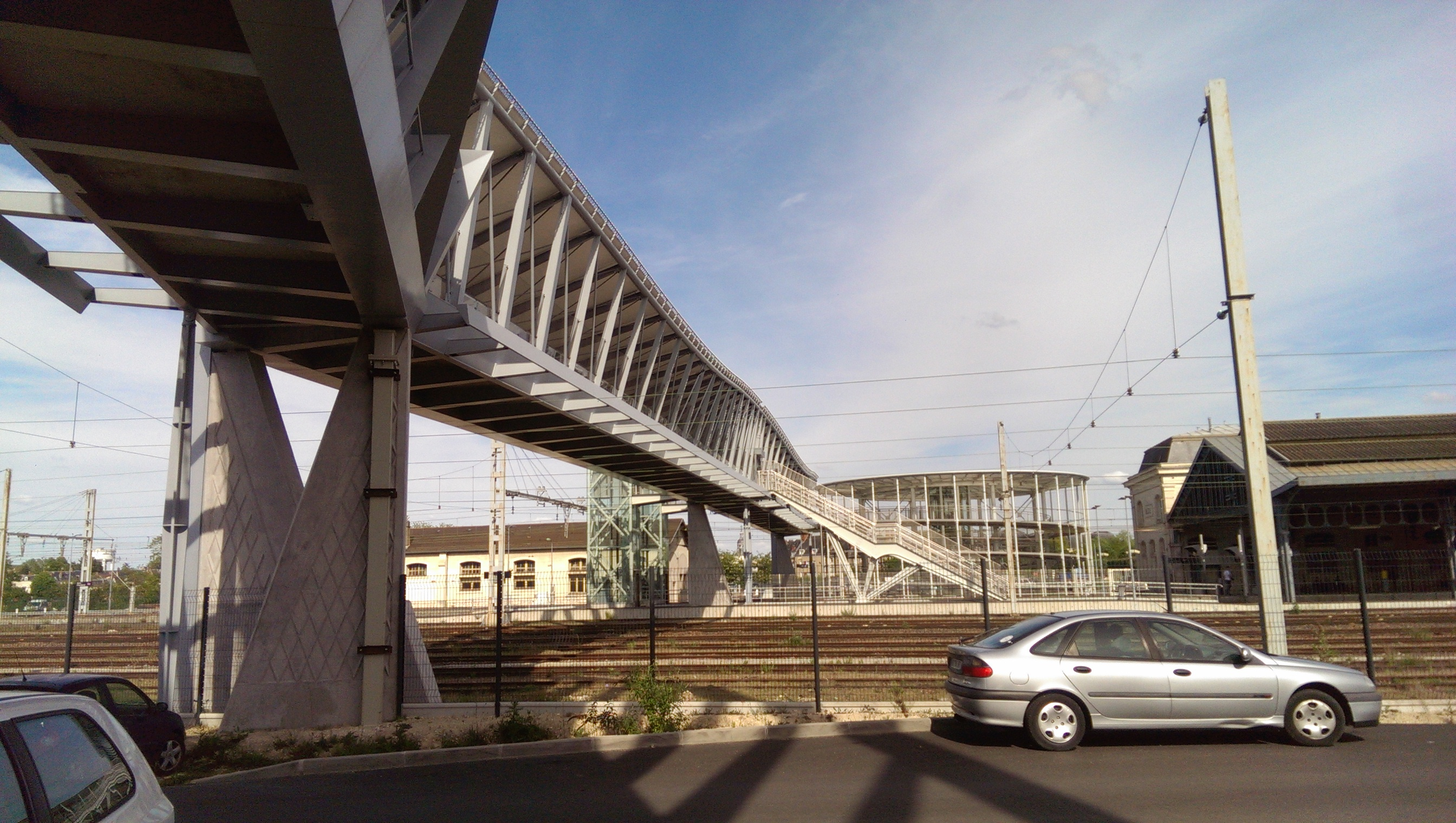 Passerelle de la gare de Blois - Chambord vue du parking.